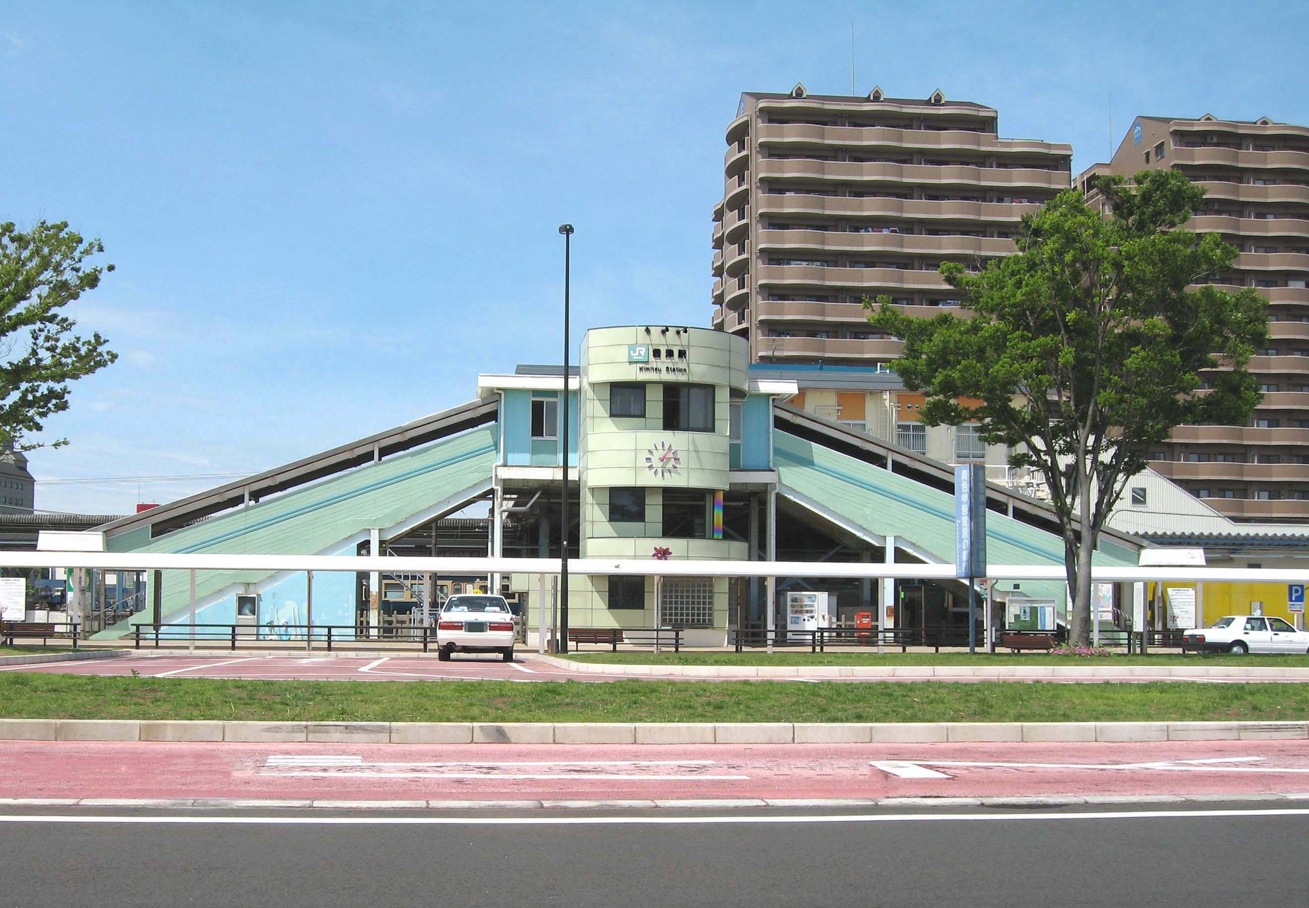 Kimitsu station, Uchibo Line, Chiba, Japan, 君津駅南口正面